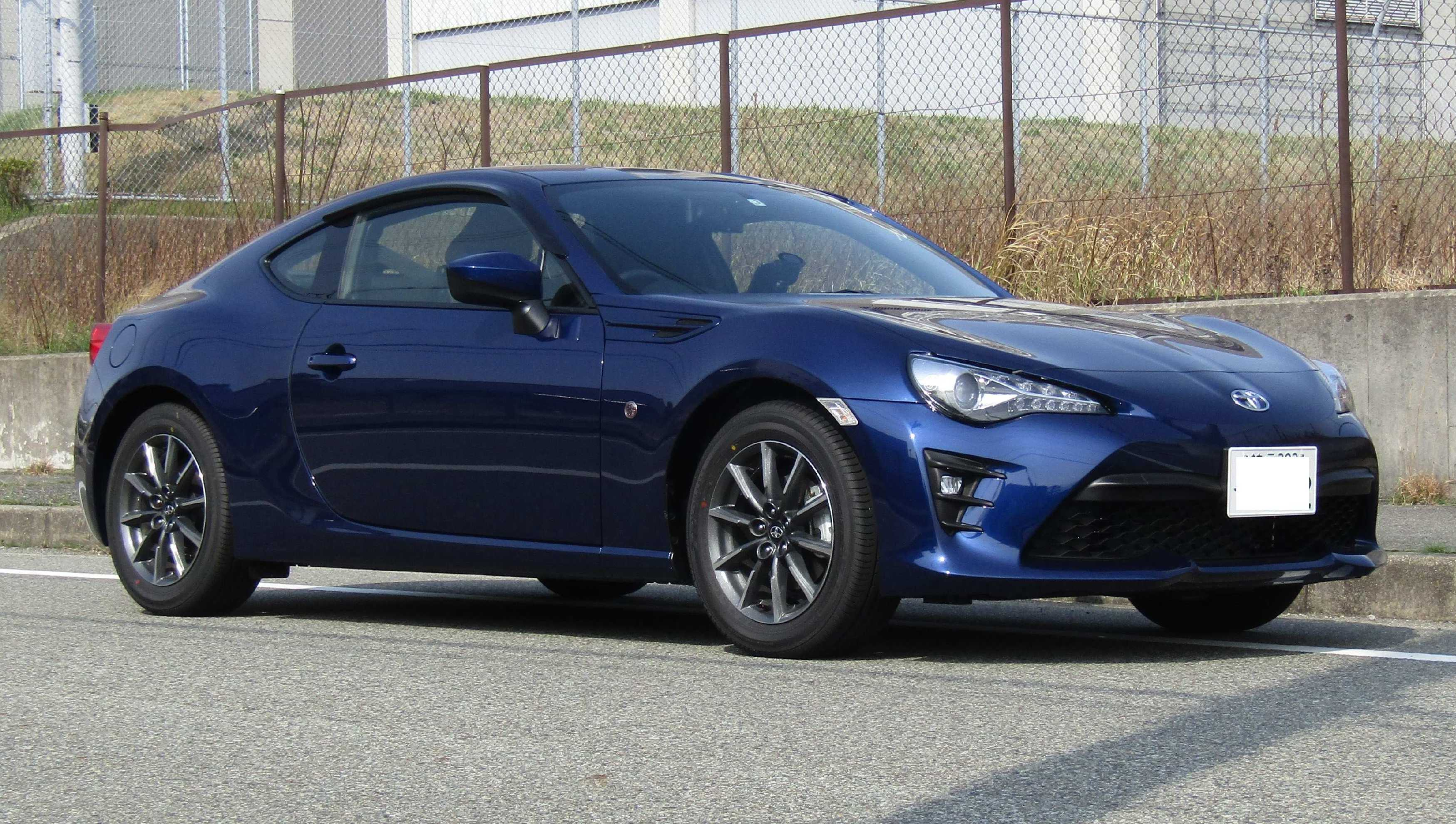 トヨタ ８６ アズライトブルー です。